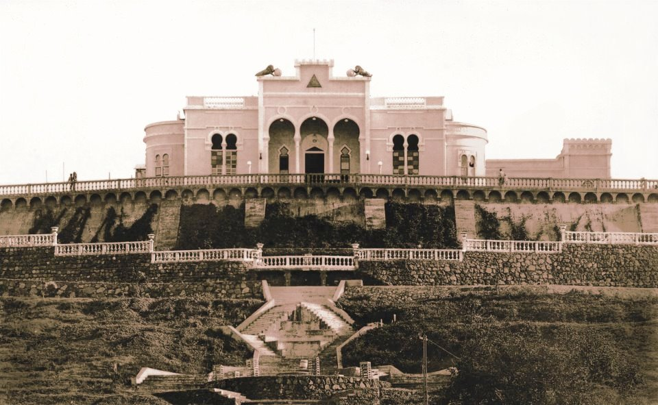 Palacio Presidencial de Nicaragua sobre la Loma de Tiscapa, 1950